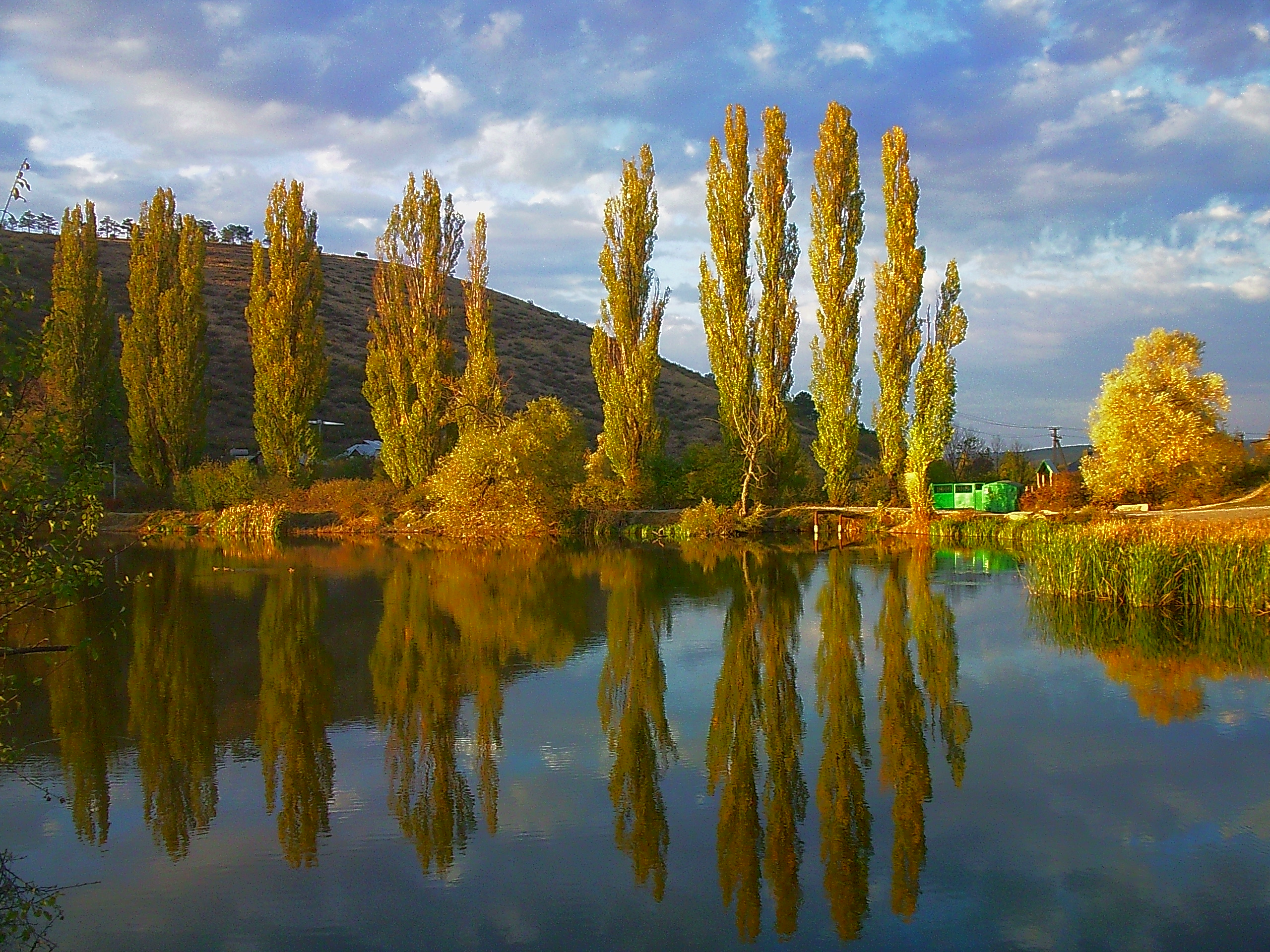 Пруд на реке Курцы, Крым.